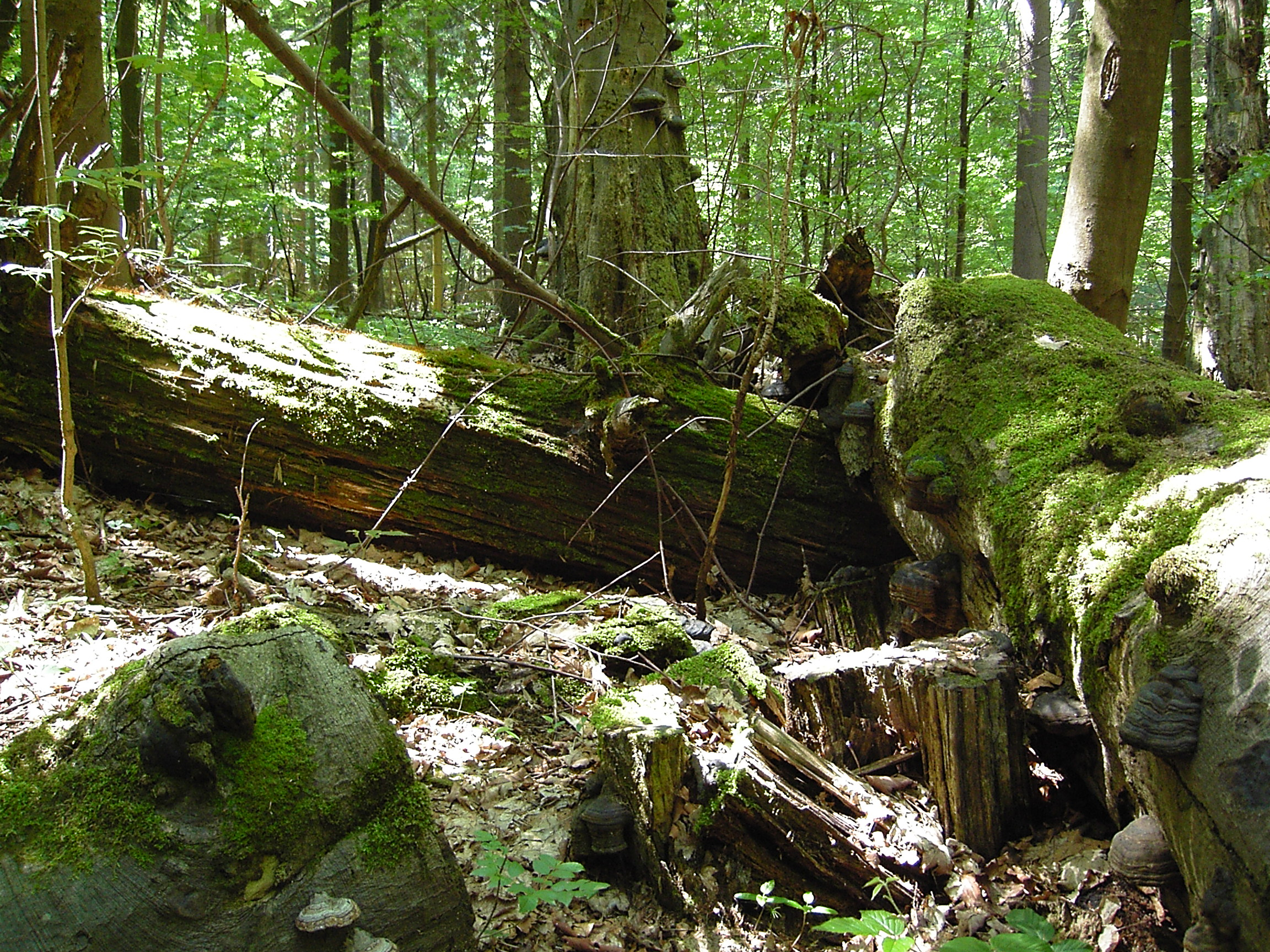 Popadané stromy v pralese Polom na Vysočině